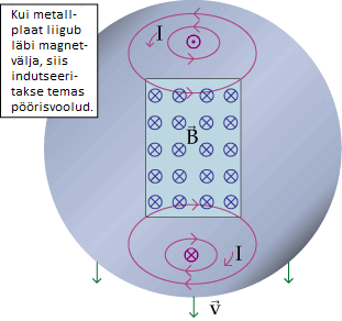 Metallplaadi liikumisel läbi muutuva magnetvälja selle jõujoonte suhtes risti indutseeritakse plaadis pöörisvoolud.